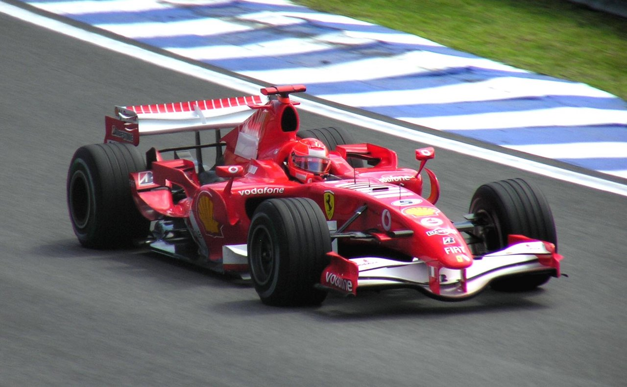 Formula One 2006 Rd.18 Interlagos: #5 Michael Schumacher (Scuderia Ferrari)